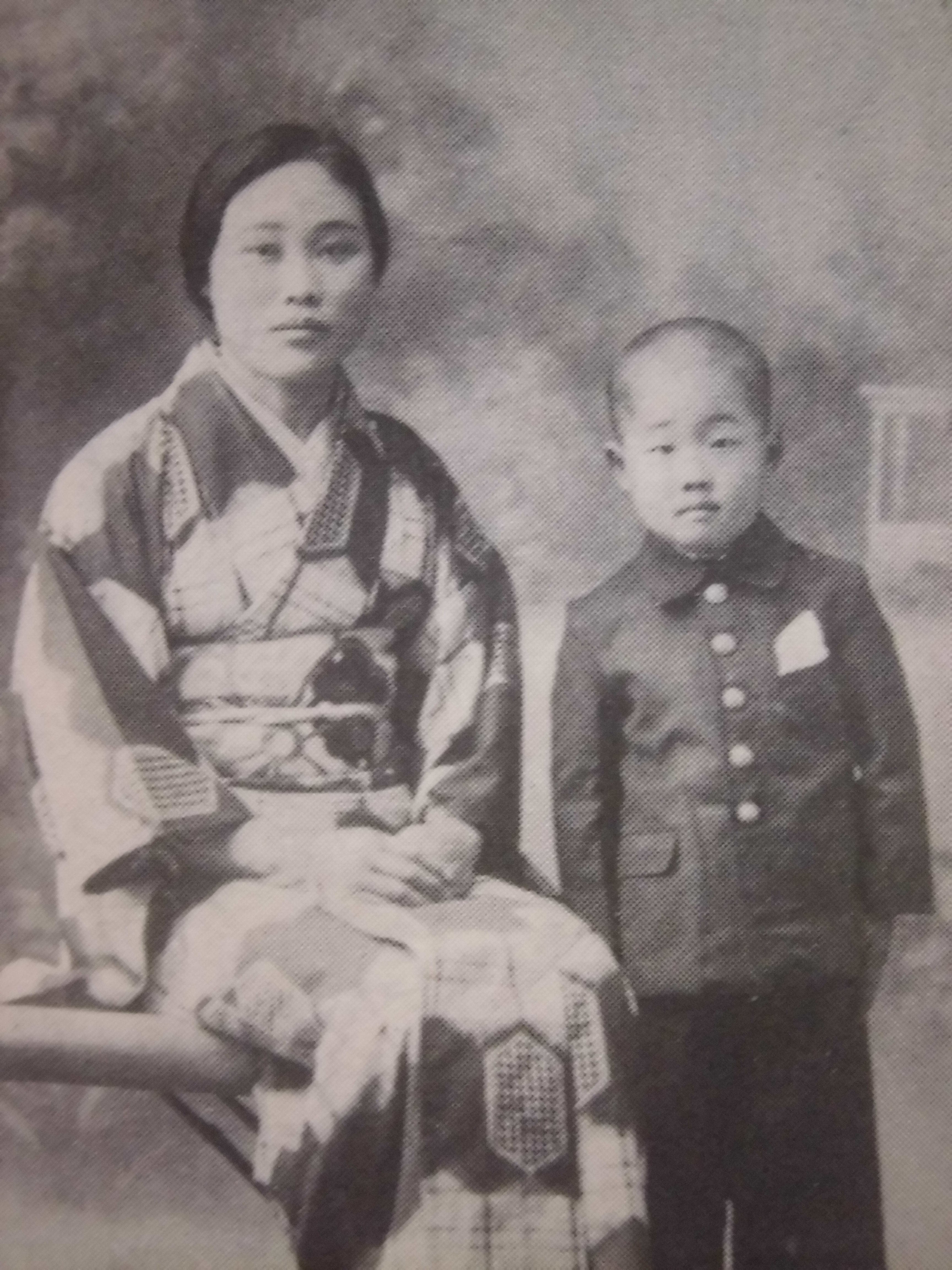 清水家の人（Shimizu Family）